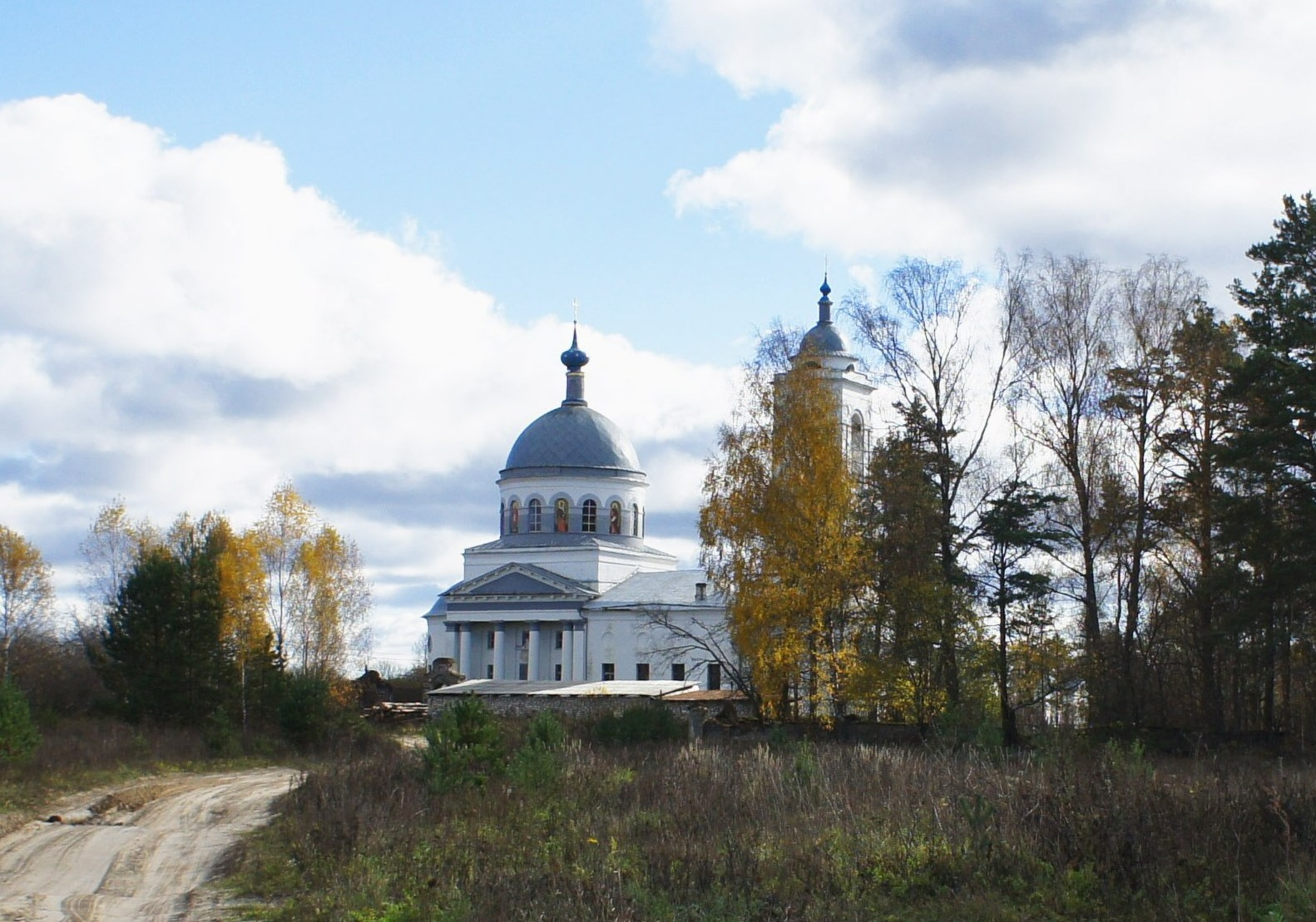 Церковь Воскресения Христова (комплекс): Картмазово, Судогодский район, Владимирская область